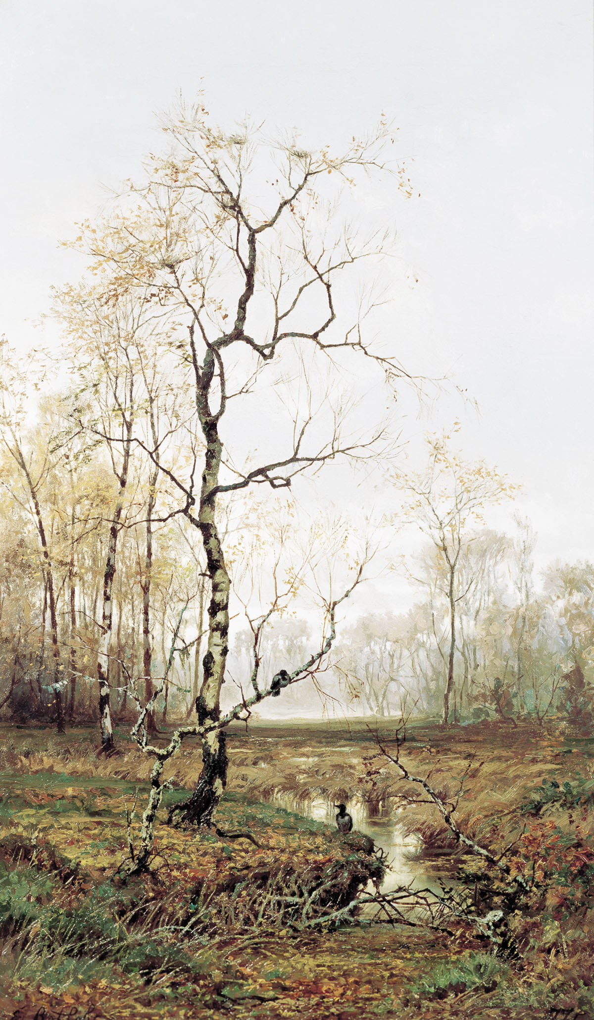 «В лесу. По весне» Forest. In Spring